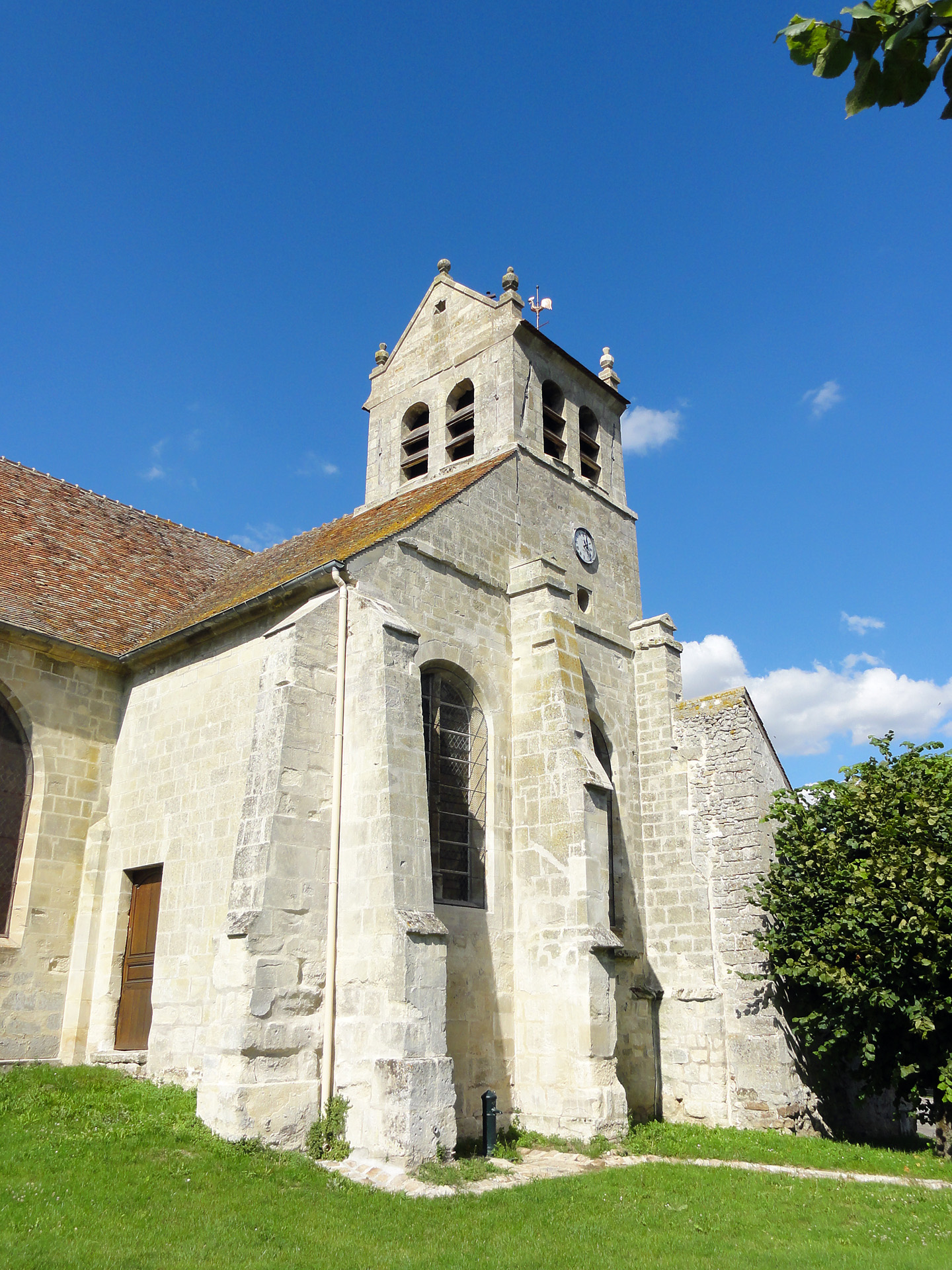 L'église Saint-Romain de Wy-dit-Joli-Village (Val-d'Oise), France.